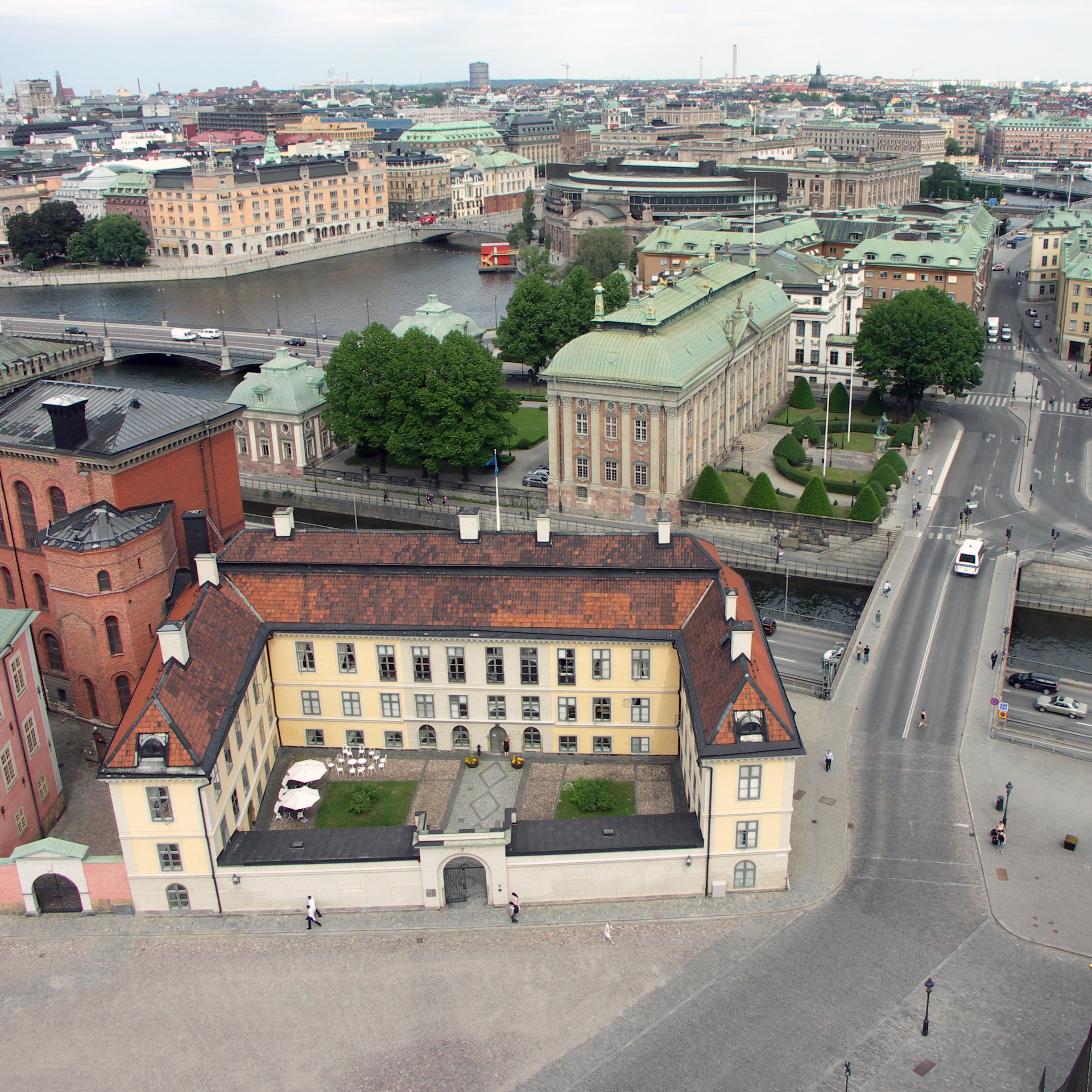 Hessensteinska palatset sett från Riddarholmskyrkans spira. Foto: Alexandru Babos, SFV.